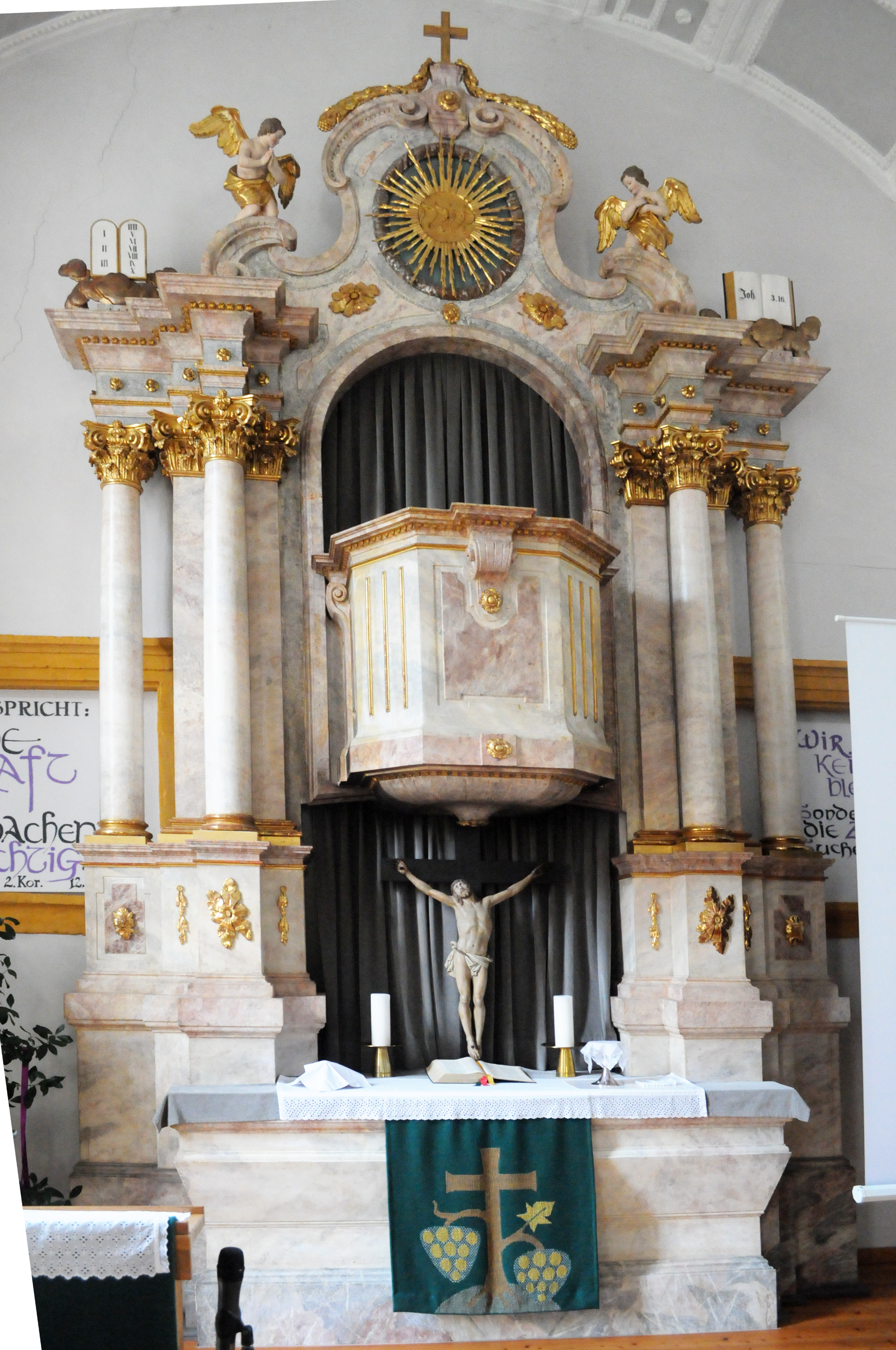 Evangelische Elisabethkirche, Murau. Altar